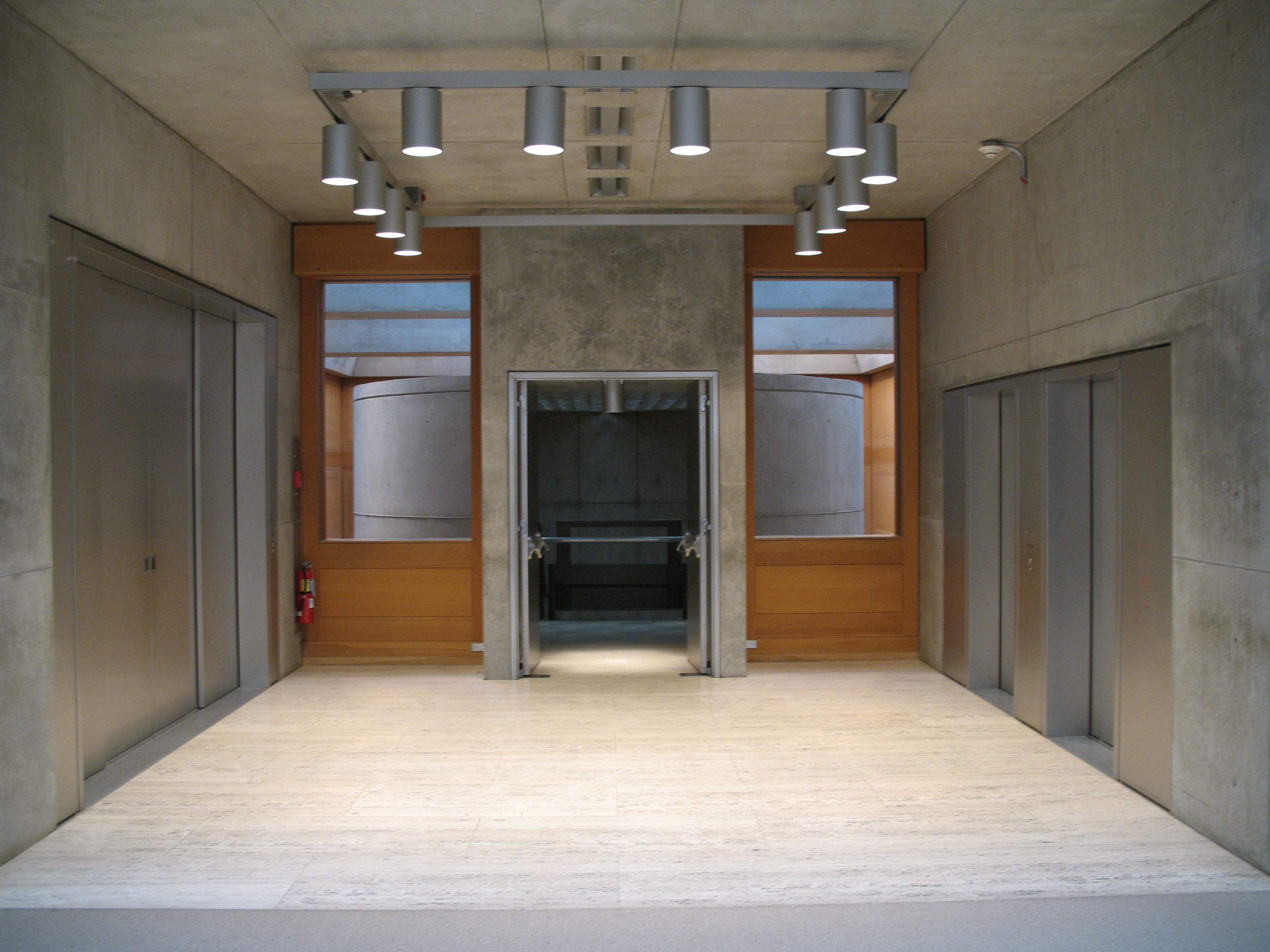 Un intérieur du bâtiment abritant le Yale Center for British Art